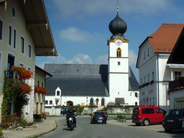 Truchtlaching: Pfarrkirche